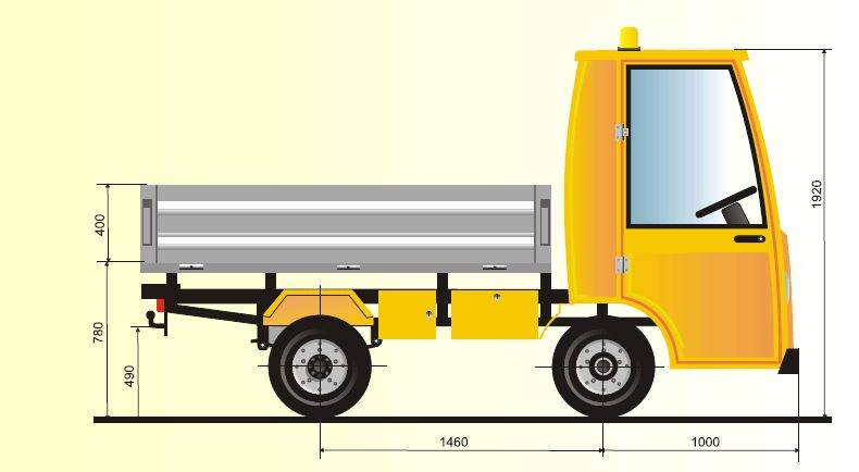 размери на Пони